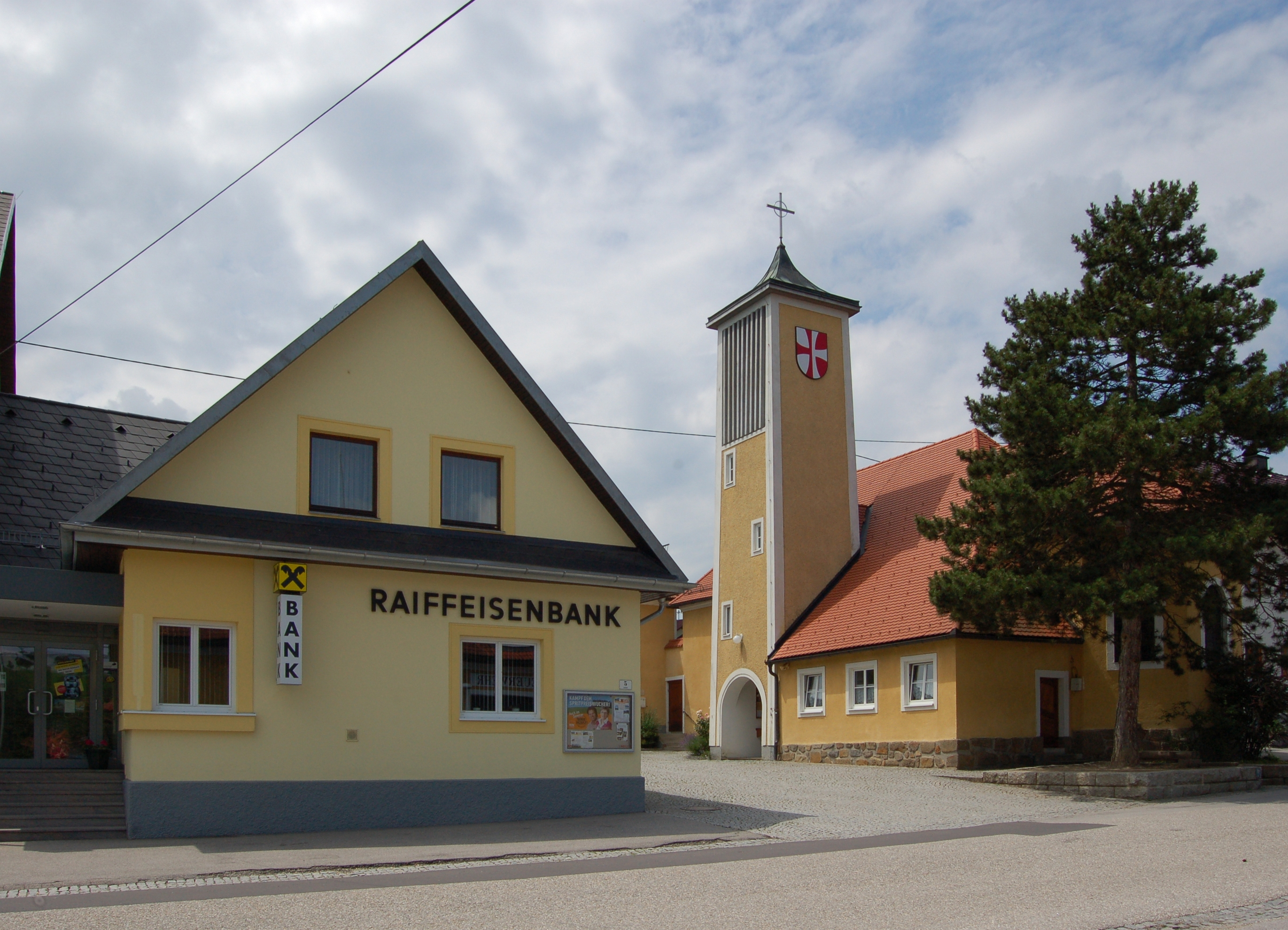 Die Kirche Maria-Hilf wurde zwischen 1930 und 1933 errichtet und zwischen 1952 und 1953 erweitert. Der Glockenturm wurde 1961 angebaut.